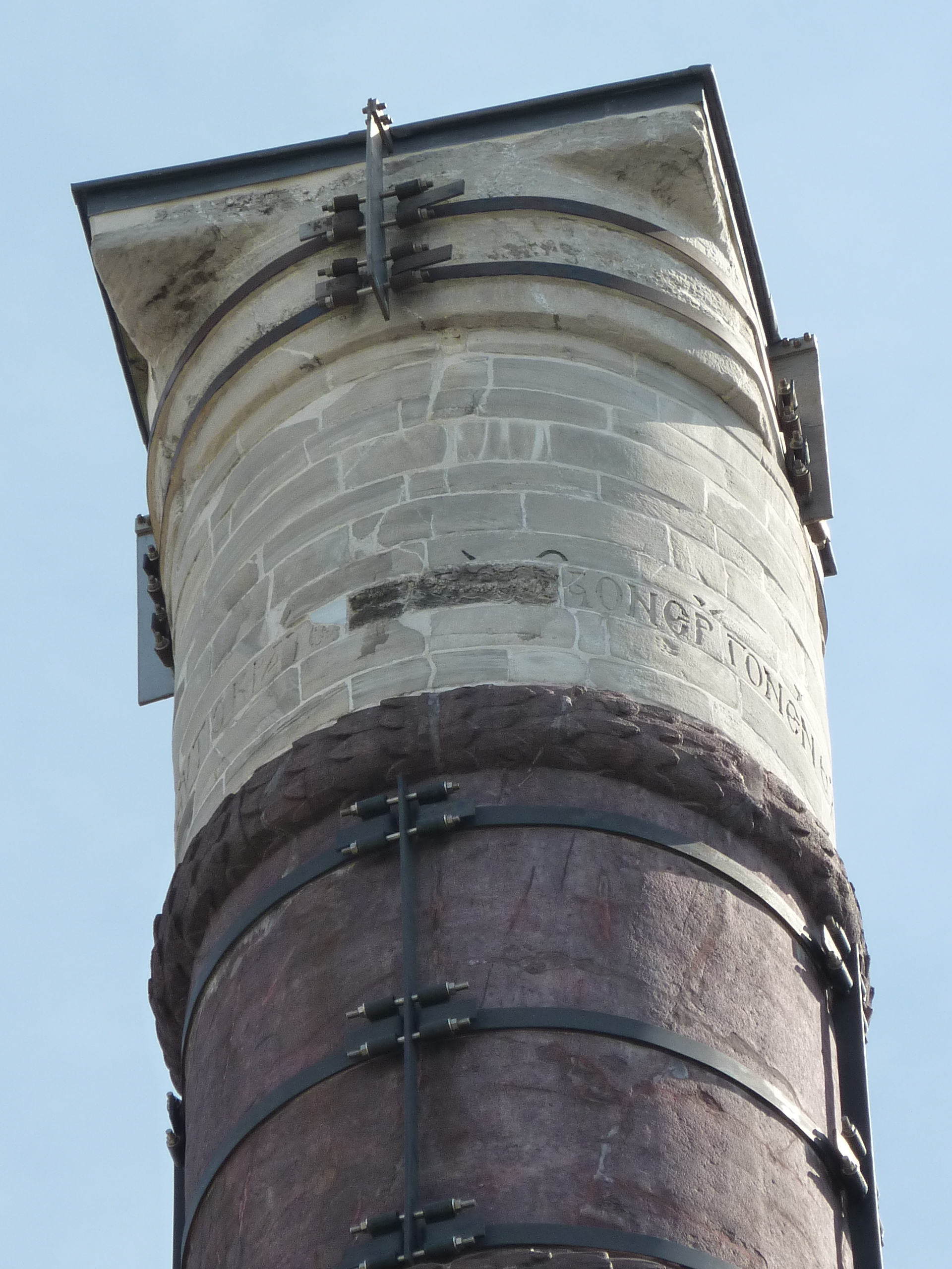 Partie haute de la colonne de Constantin, à Constantinople.